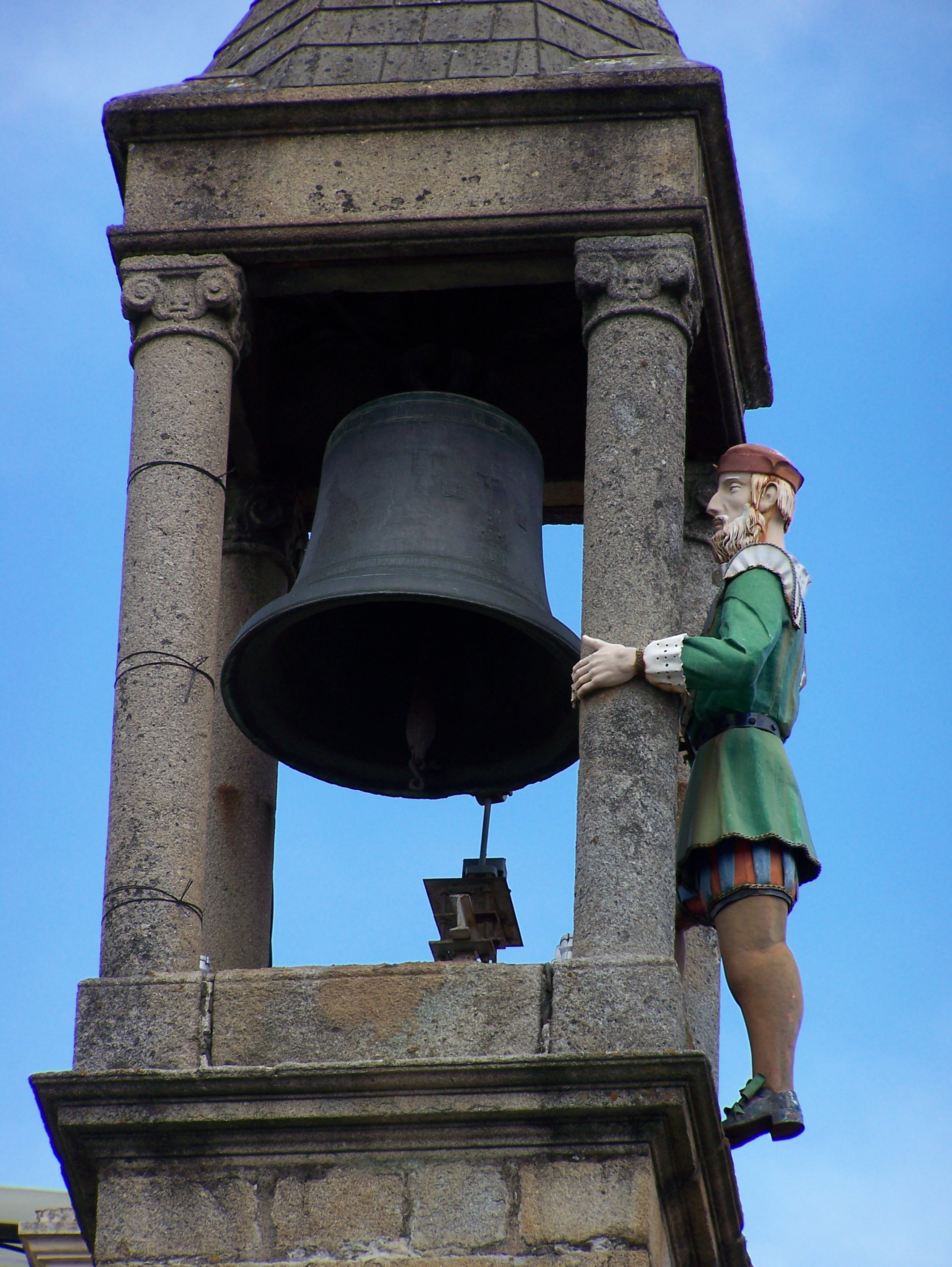 100_3839. Plaza Mayor, El Abuelo Mayorga